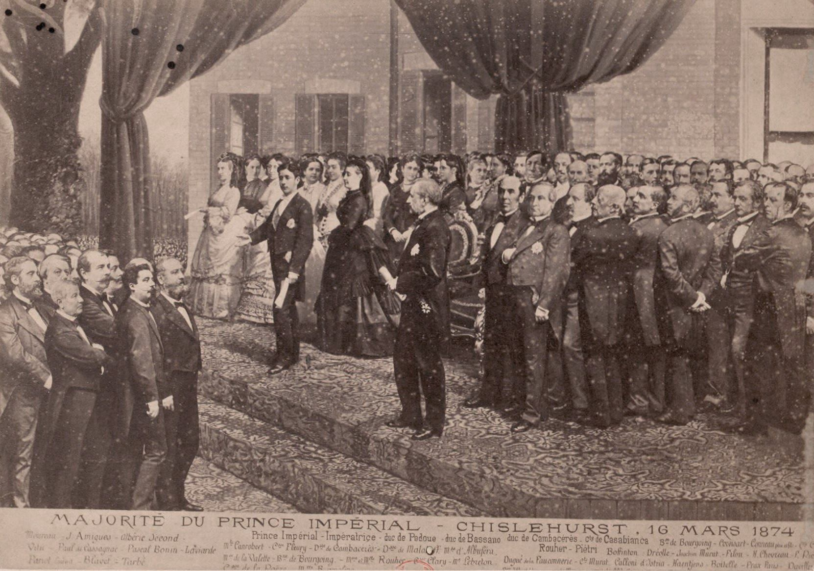 "Majorité du Prince impérial. Chislehurst. 16 mars 1874".